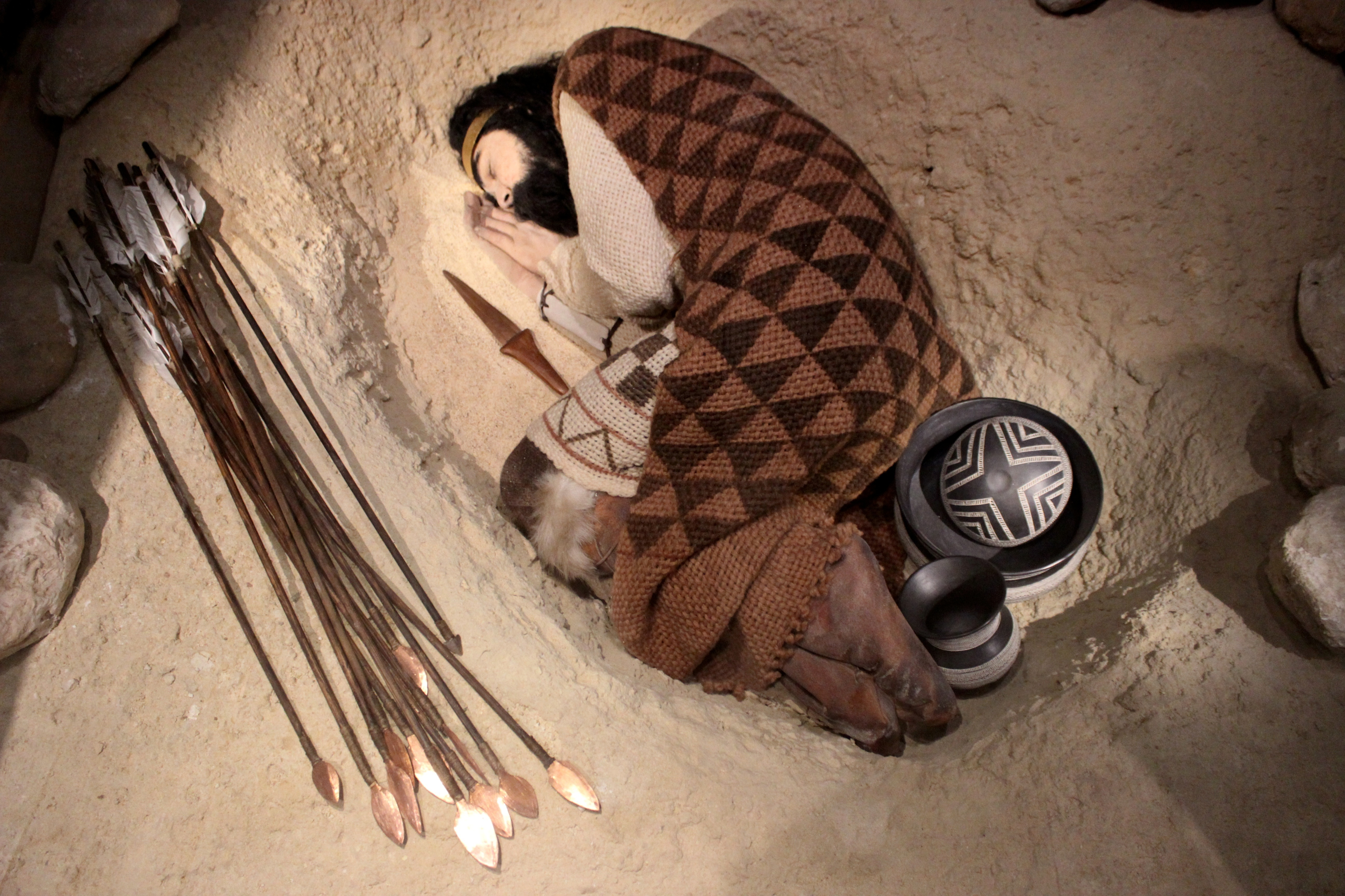 Madrid, Museo Arqueológico Nacional. Recreación de un enterramiento de la cultura campaniforme.